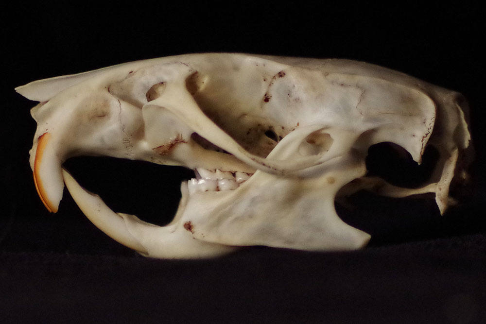 Vue latérale d'un crâne de rat noir (Rattus rattus)